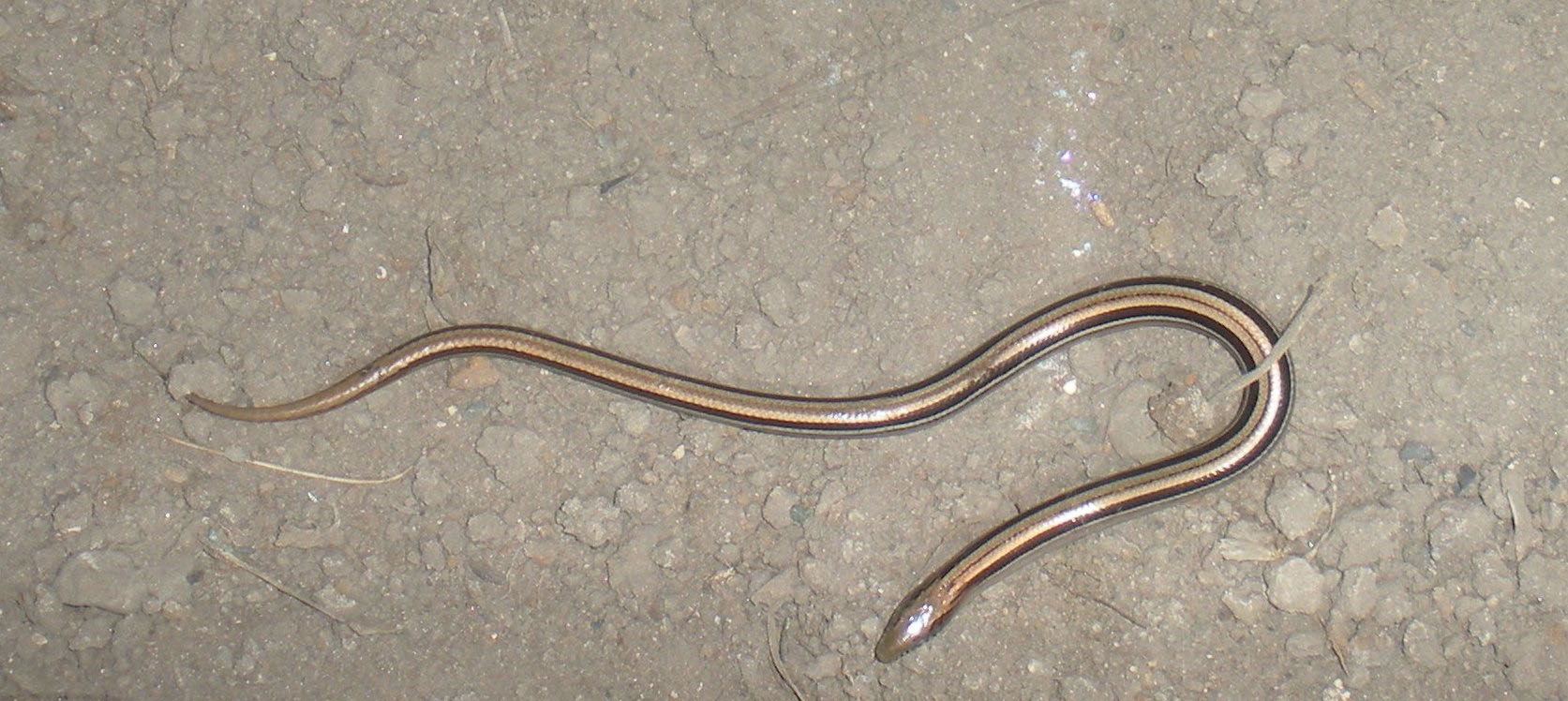 Lagarto ápodo Ophiodes